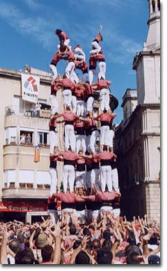 Primer 9 de 8 descarregat de la història, fet el 7 d'octubre del 2001 per la Colla Vella dels Xiquets de Valls en la diada del Mercadal de Reus.